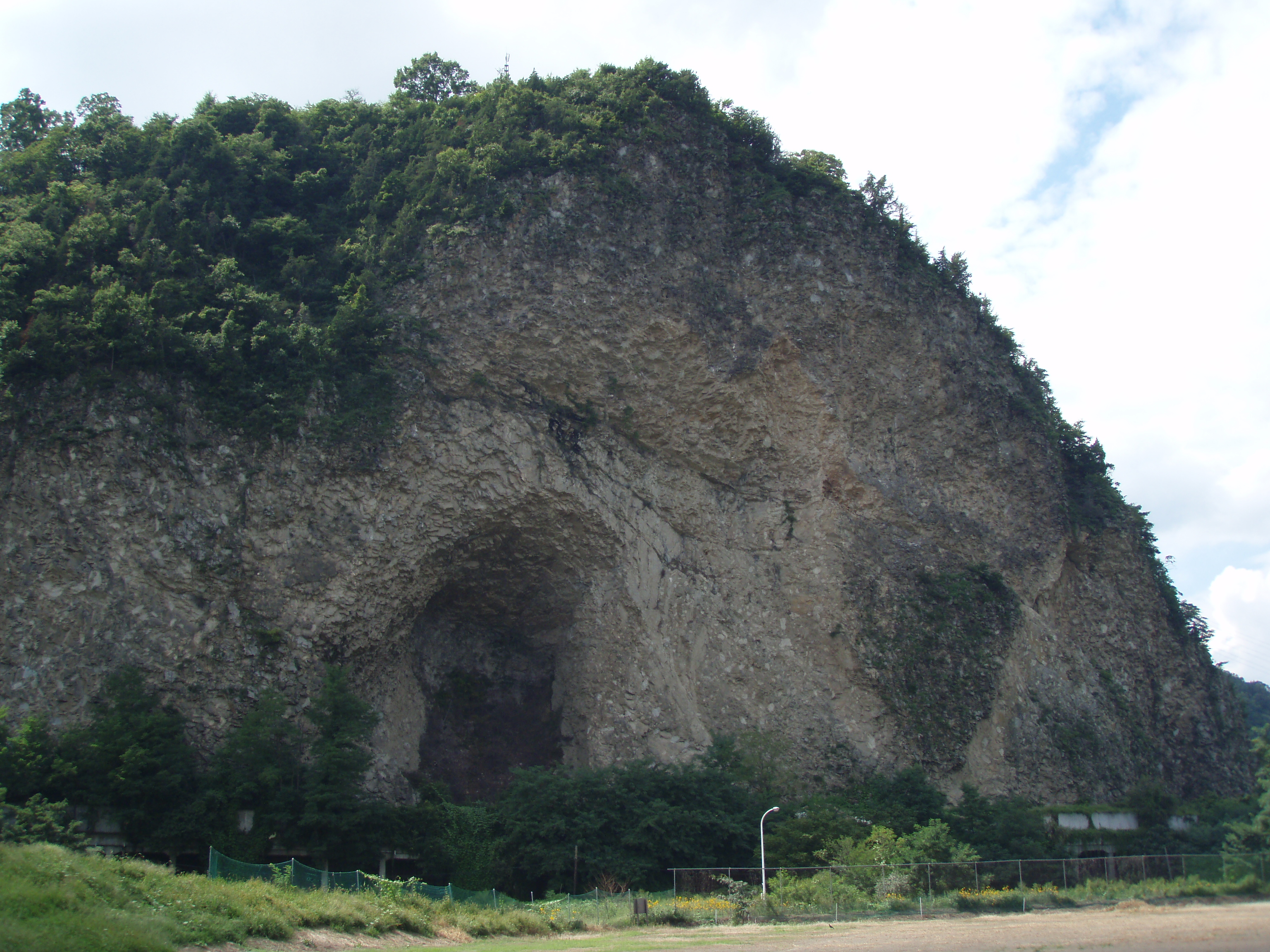 千曲川河川敷から望む半過岩鼻。別所層に貫入してきた石英角閃石ひん岩を見る事が出来る。